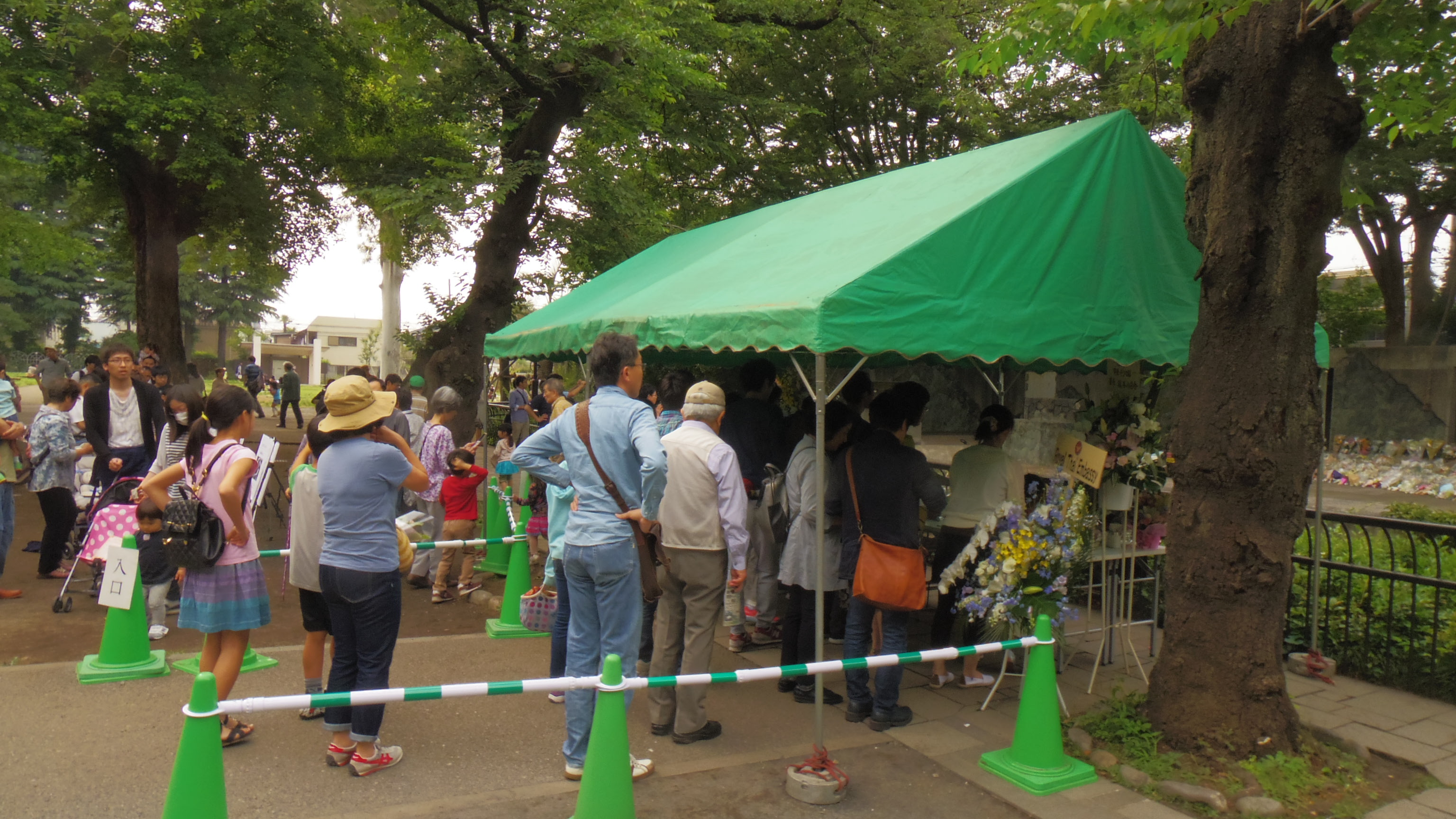 井の頭自然文化園の名物として知られたインドゾウの「はな子」が2016年5月26日に69歳で逝去したことを受け、献花などをする来園者たち。2016年5月28日、井の頭自然文化園にて撮影。